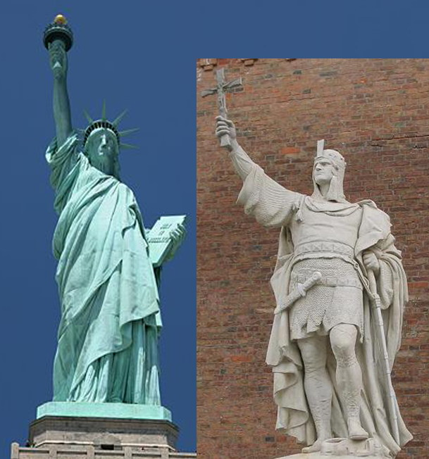 Gegenüberstellung zweier symbolhafter Statuen: Freiheitsstatue in New York und Markraf Albrecht der Bär in Berlin